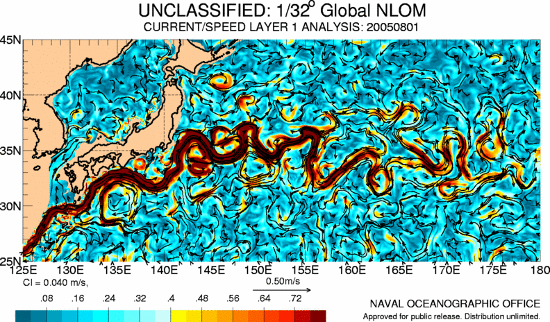 Fließgeschwindigkeit des Kuroshio am 01. August 2005. Die Grafik zeigt an den dunkelsten Stellen eine Geschwindigkeit von 36 cm/s. (0,72/0,5)